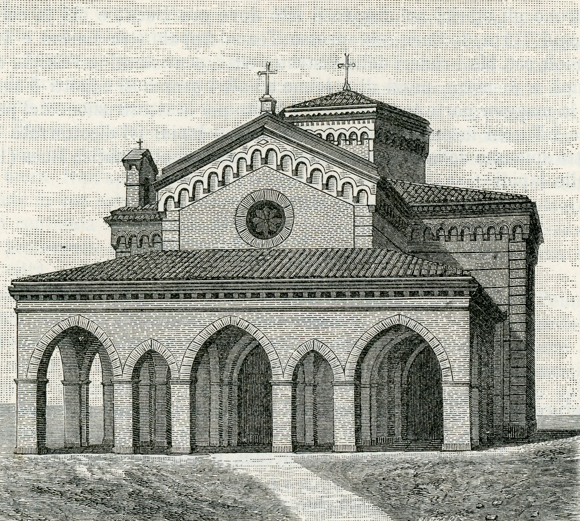 Vasto (dintorni): chiesa di Santa Maria della Penna ricostruita nel 1887 (xilografia di Barberis 1898).